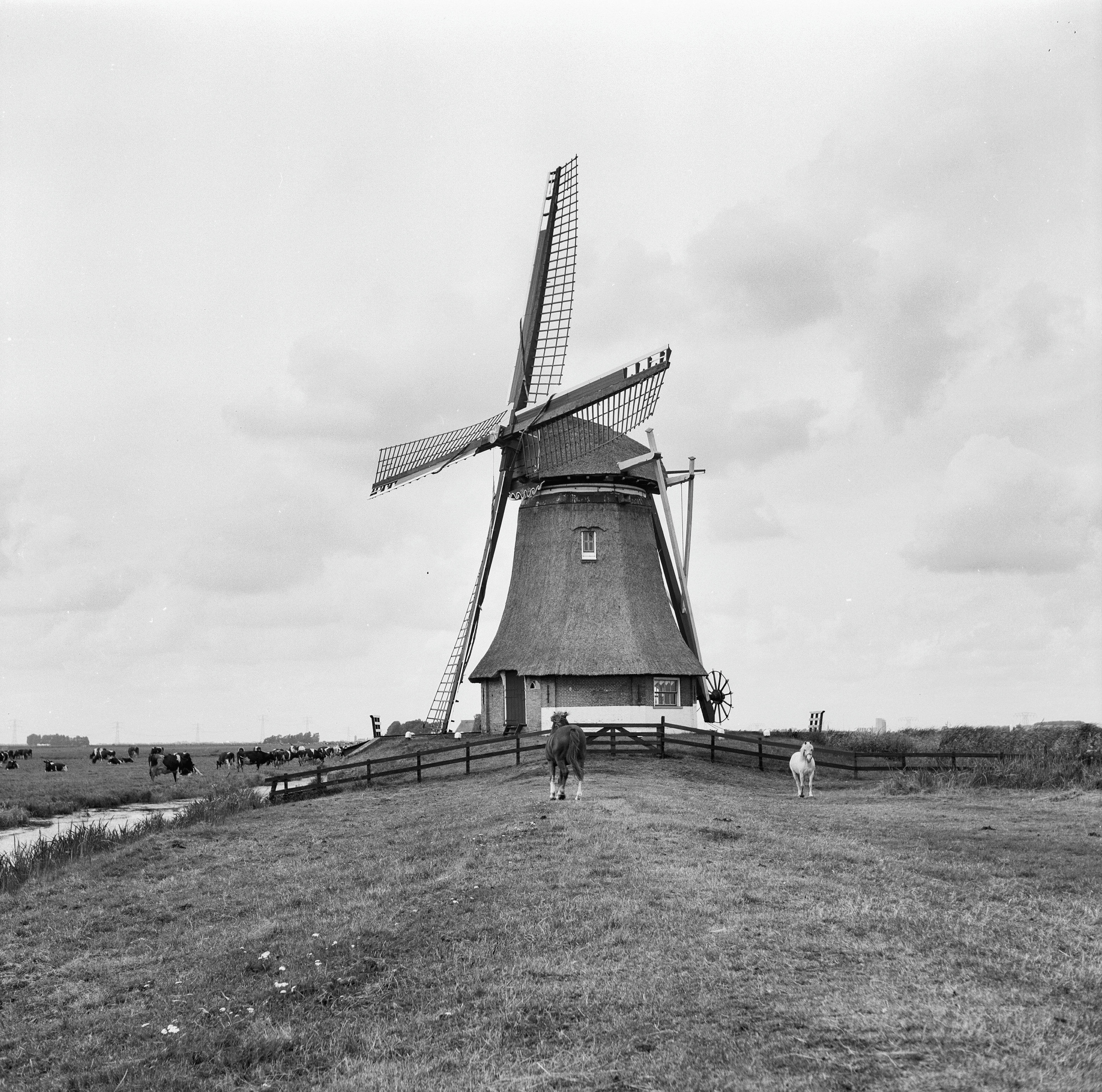 Diversen: watermolen "De Grevensmolen", exterieur